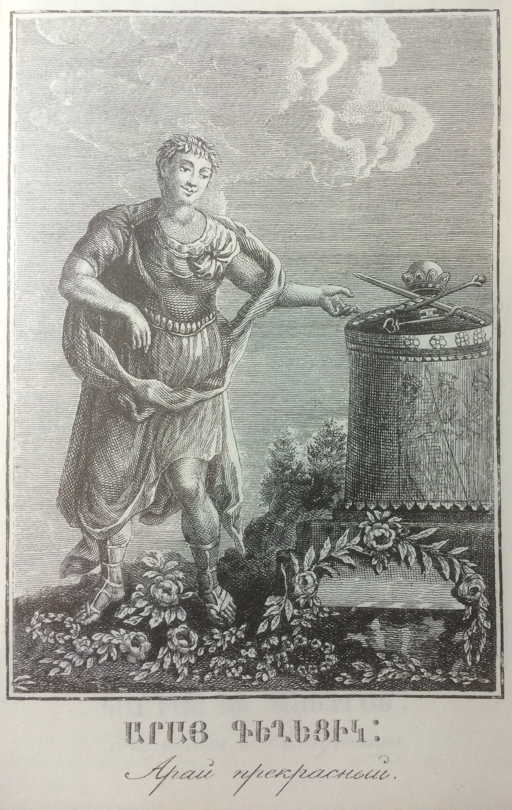 Արա Գեղեցիկ